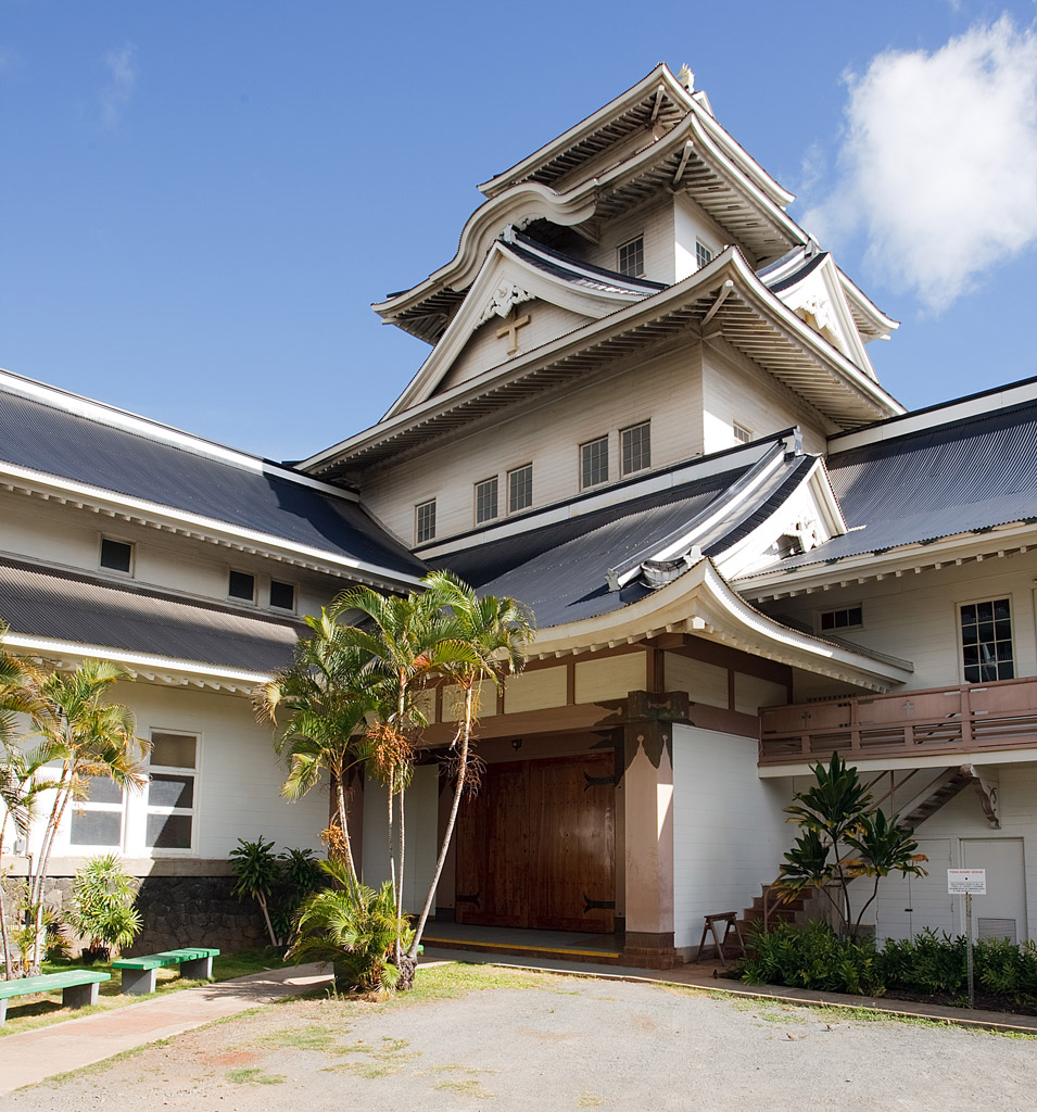 Makiki Church